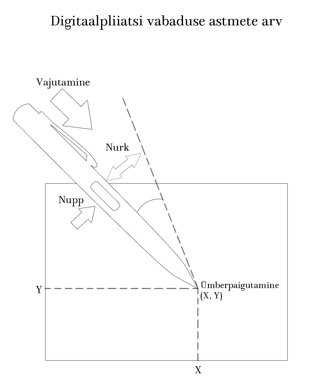 Digitaalpliiatsi vabadusastmete arv